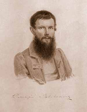 Завалишин, Дмитрий Иринархович